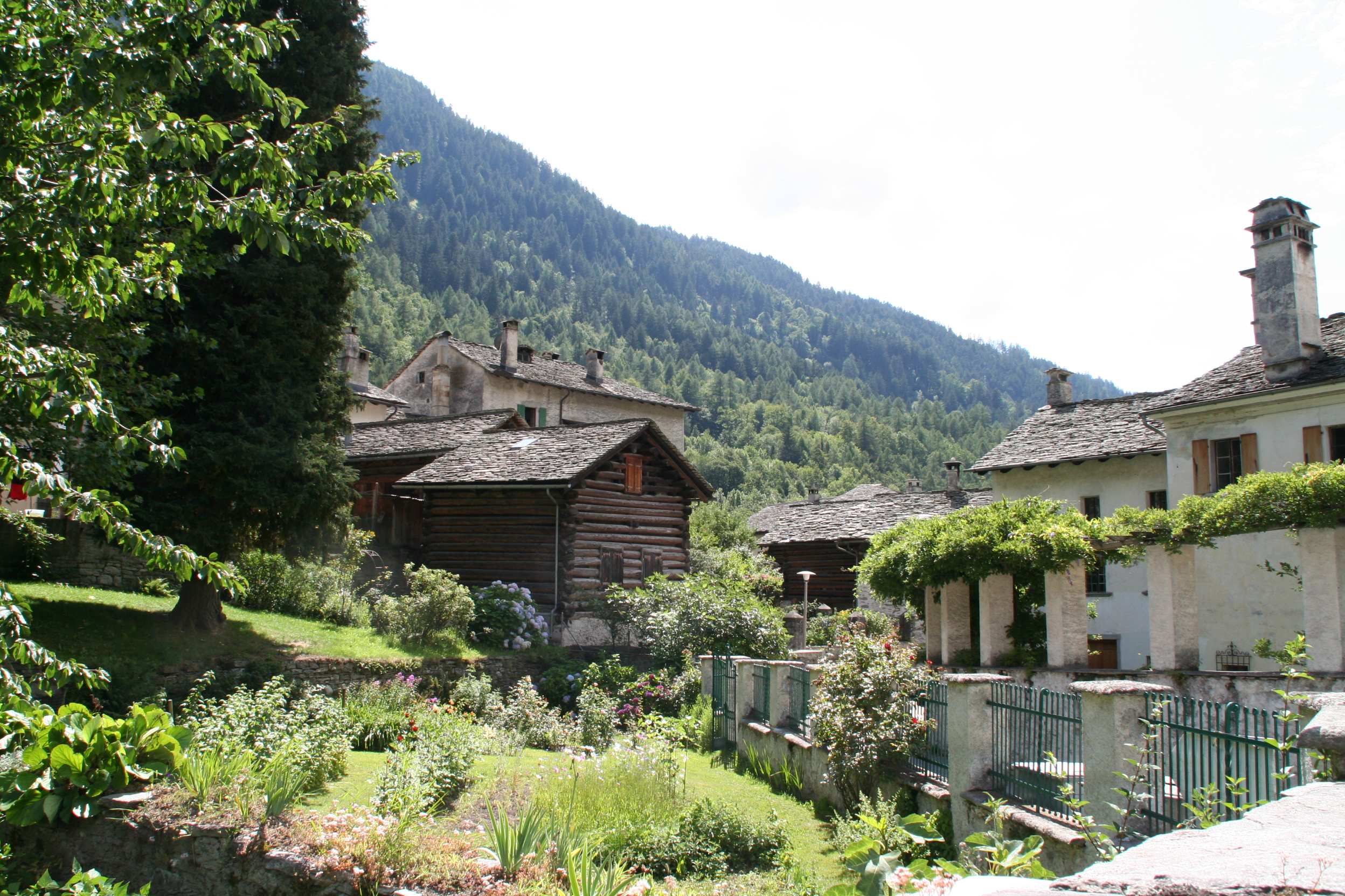 in Bondo GR